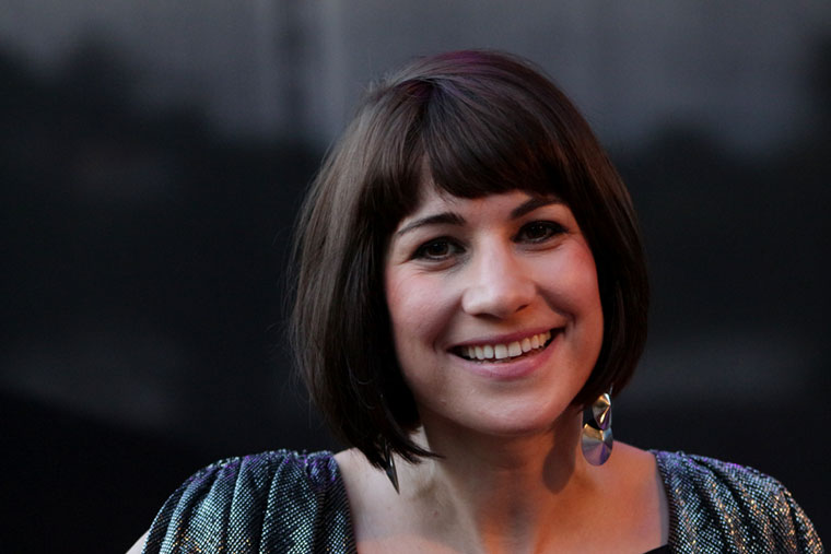 Pátkai Rozina (Budapest, 1978. november 1.) magyar énekesnő, dalszerző, képzőművész.